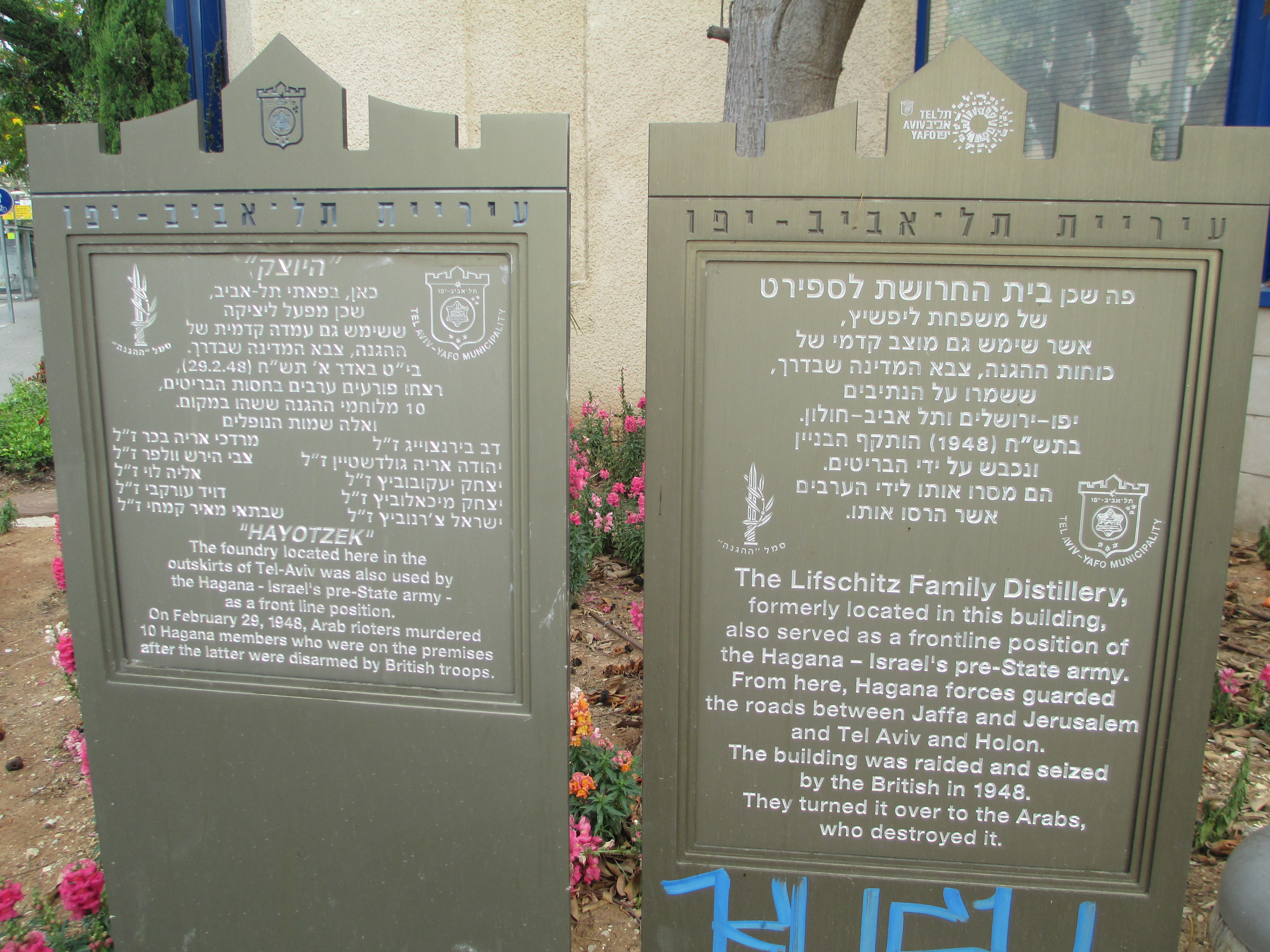 לוחיות זיכרון בצומת חולון לבתי החרושת היוצק וספירט ששמרו על דרך הביטחון במלחמת העצמאות